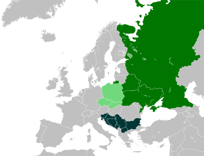 Территории славянского населения Европы